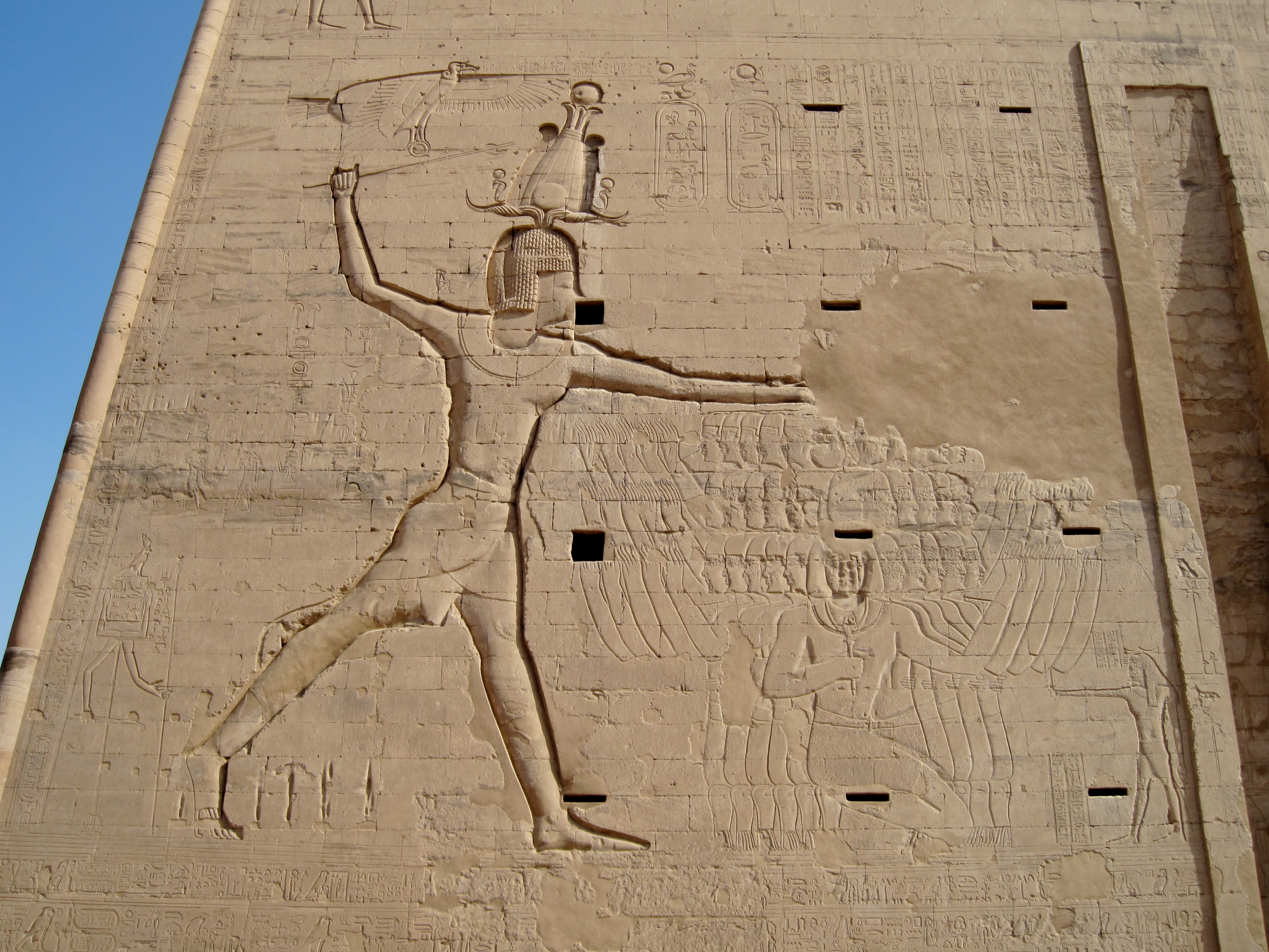 Relief am linken Turm des Tempelpylons von Edfu, Ägypten